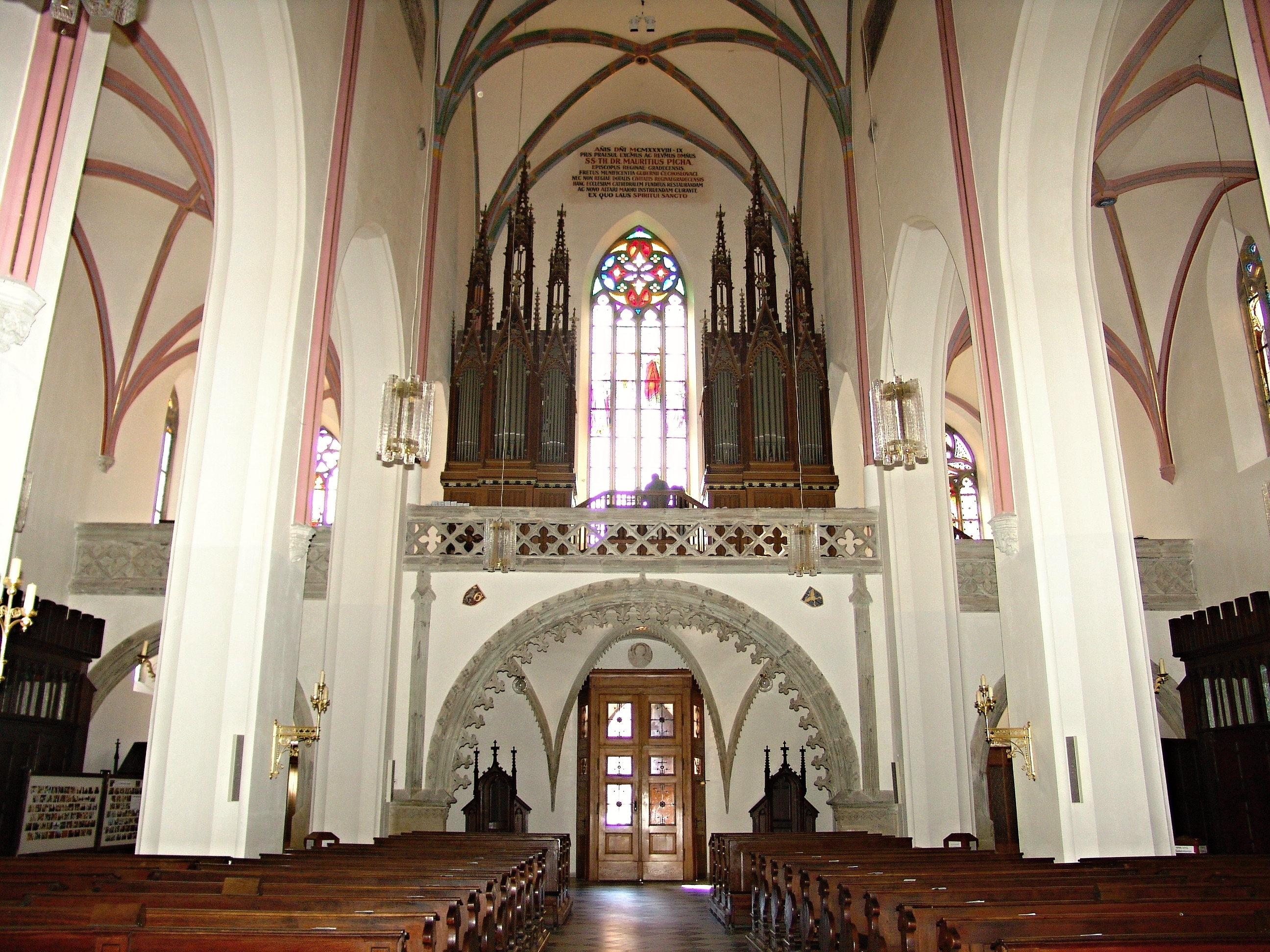 Kostel sv. Ducha, katedrální (Hradec Králové), Velké nám., Hradec Králové, Hradec Králové.